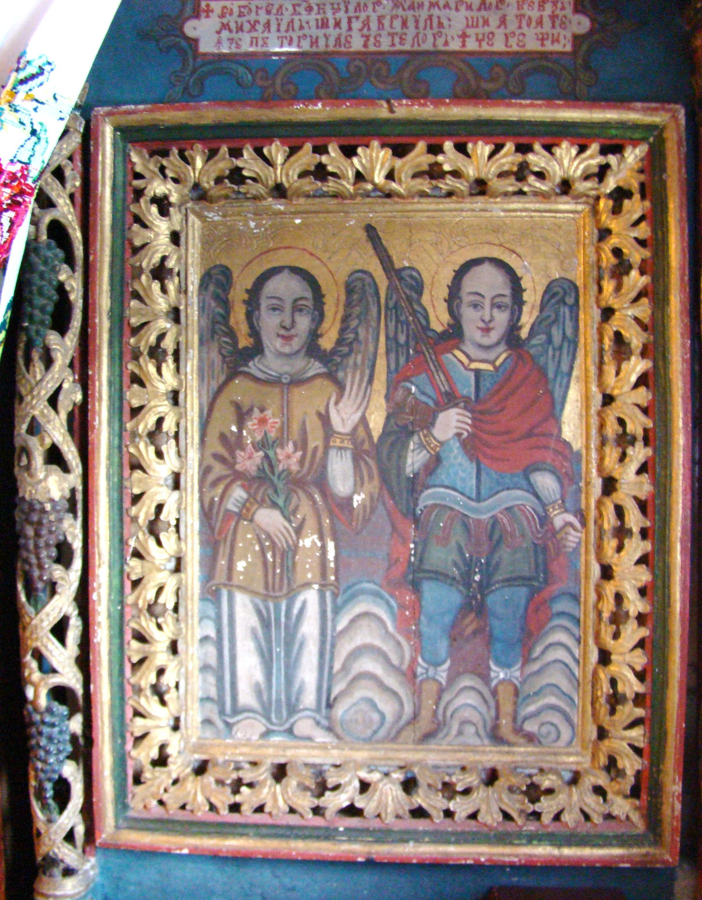 Biserica de lemn "Sfinții Arhangheli Mihail şi Gavril", sat PLOPIŞ; comuna ŞIŞEŞTI